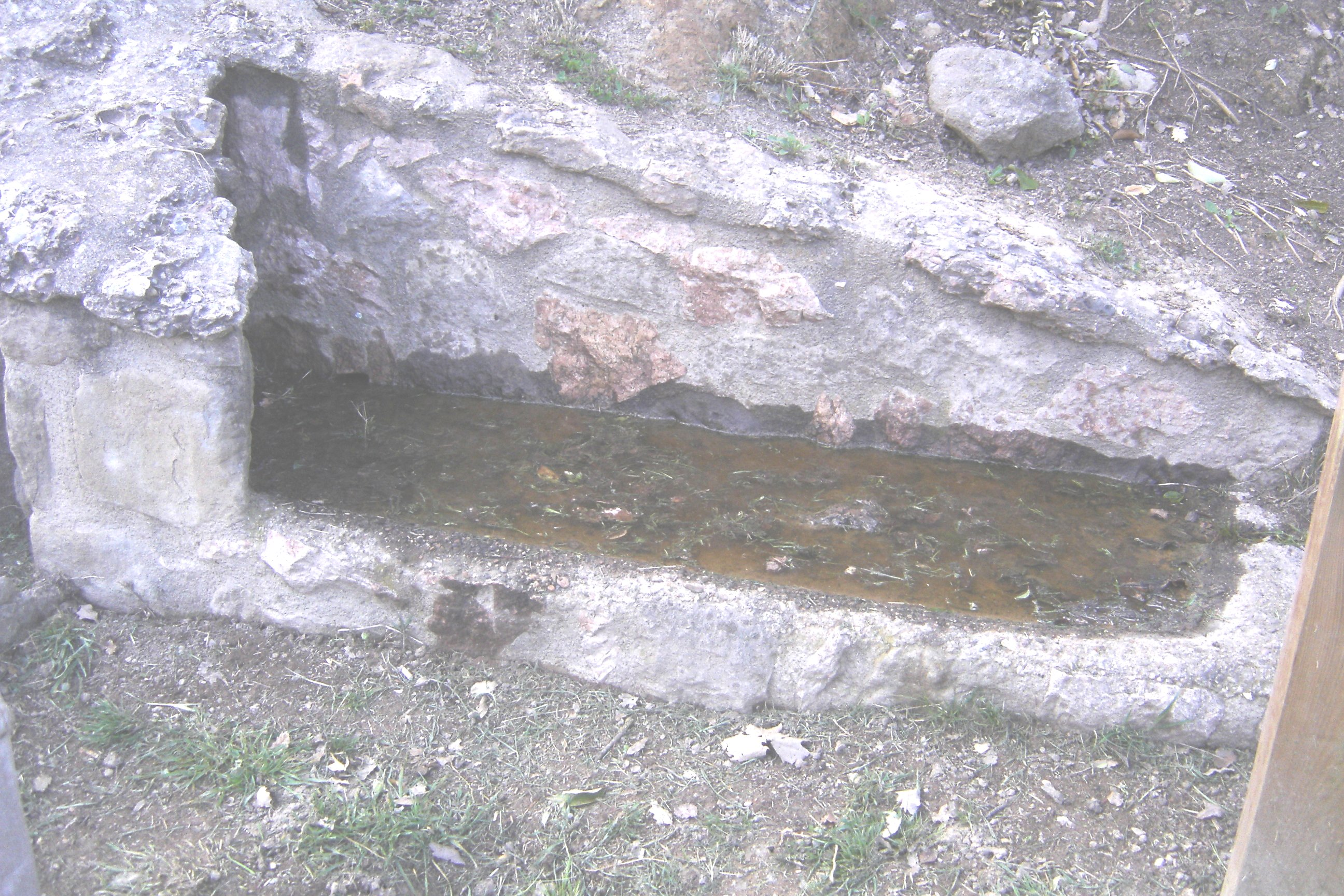 La font de l'Ocell, al municipi de Solsona (Solsonès). Detall del cóm de la dreta de la font.